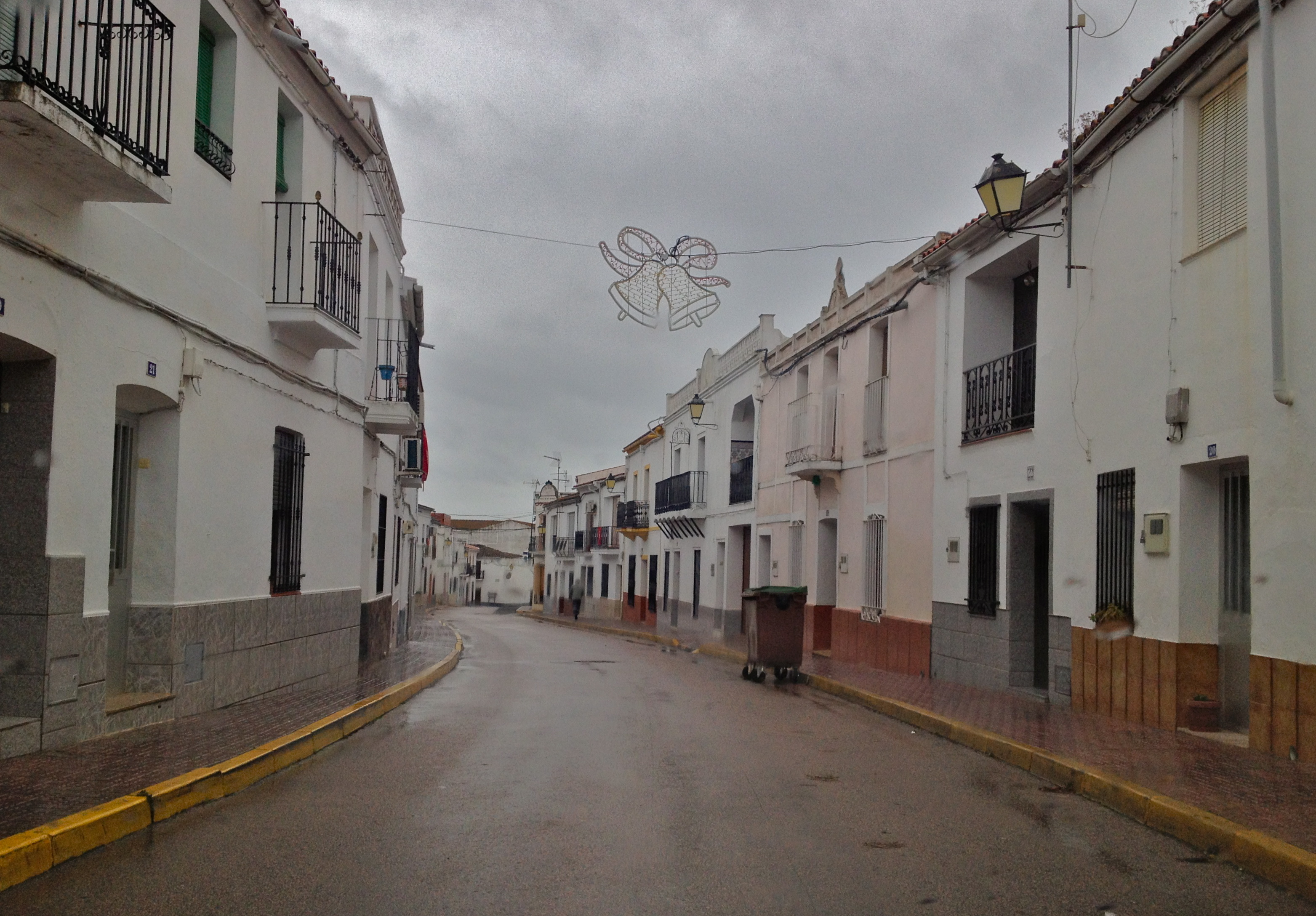 Una calle en Santiago de Alcántara, provincia de Cáceres, España